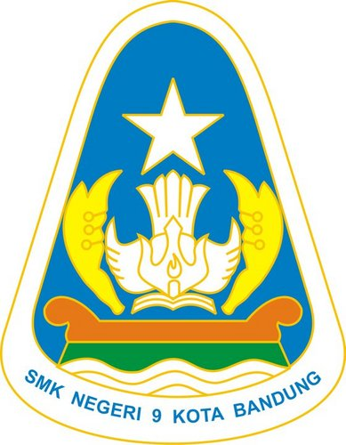 Logo SMKN 9 BANDUNG